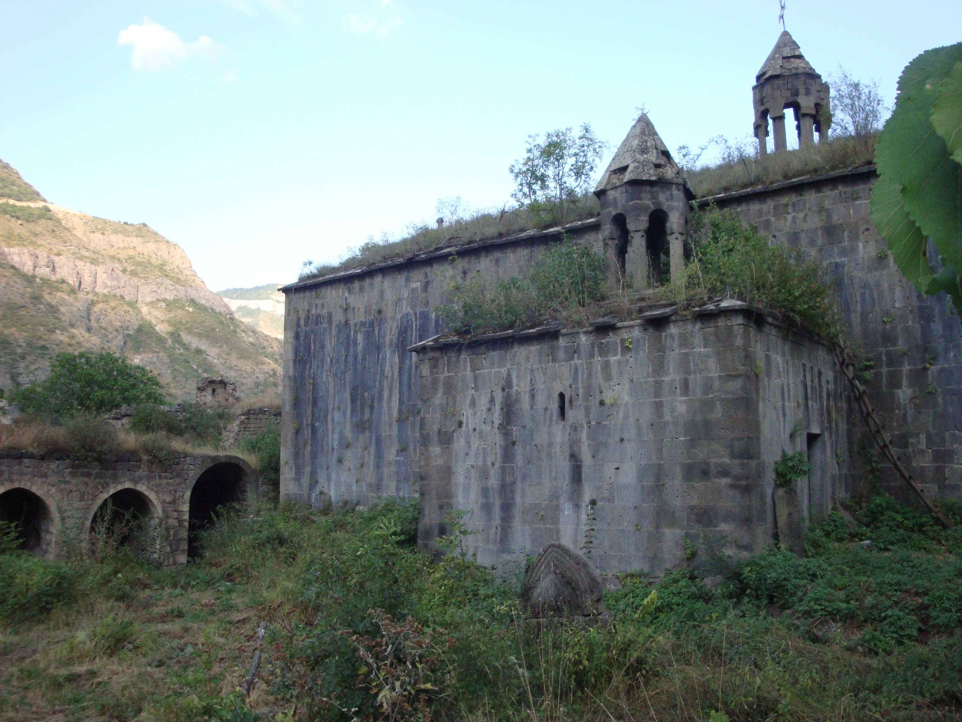 Tatevi Anapat, Syunik, Armenia.